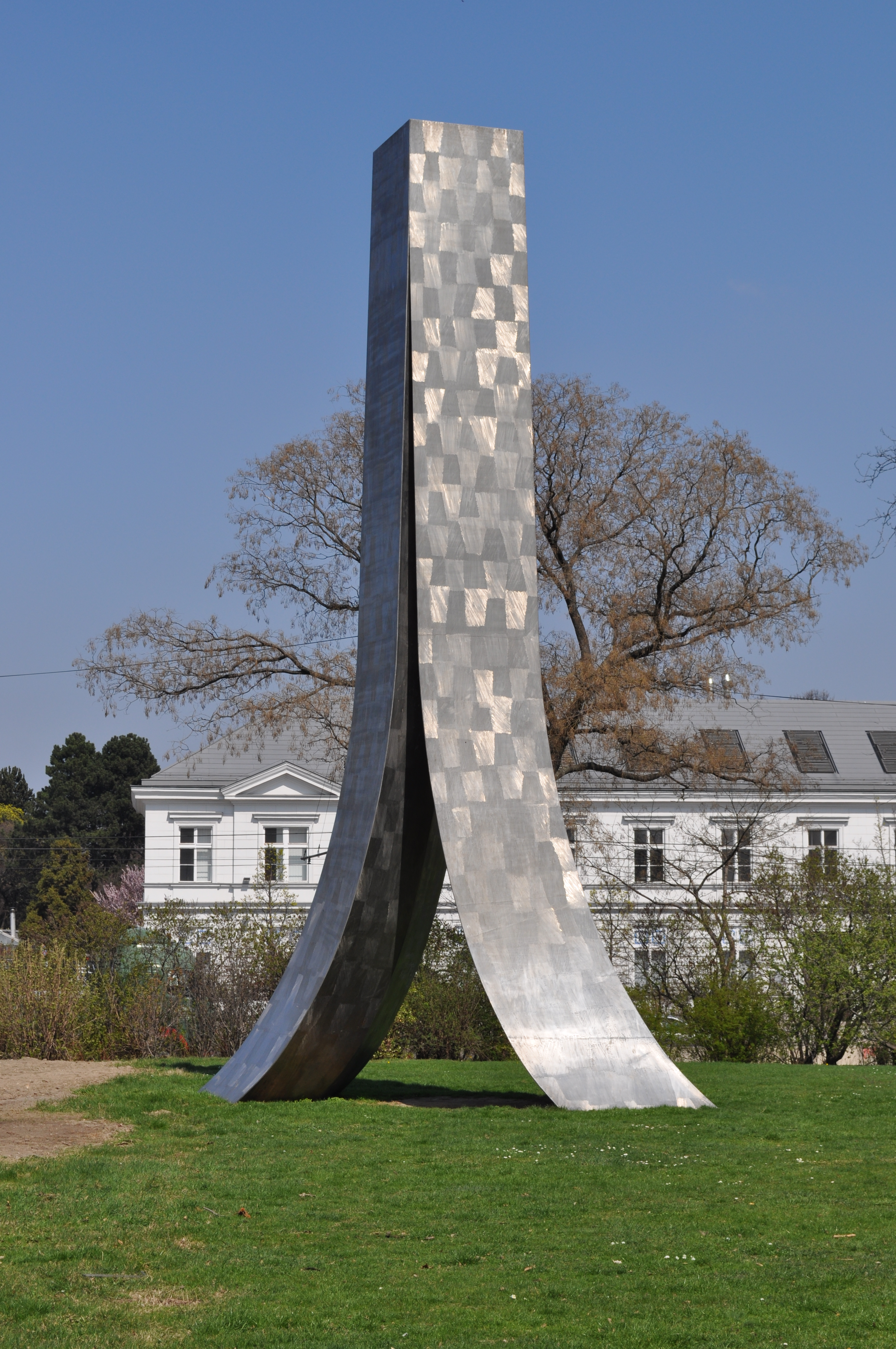 Staatsgründungsdenkmal im Schweizer Garten, Wien